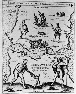 Una idealizada visión del estrecho y de Ciudad Rey Don Felipe